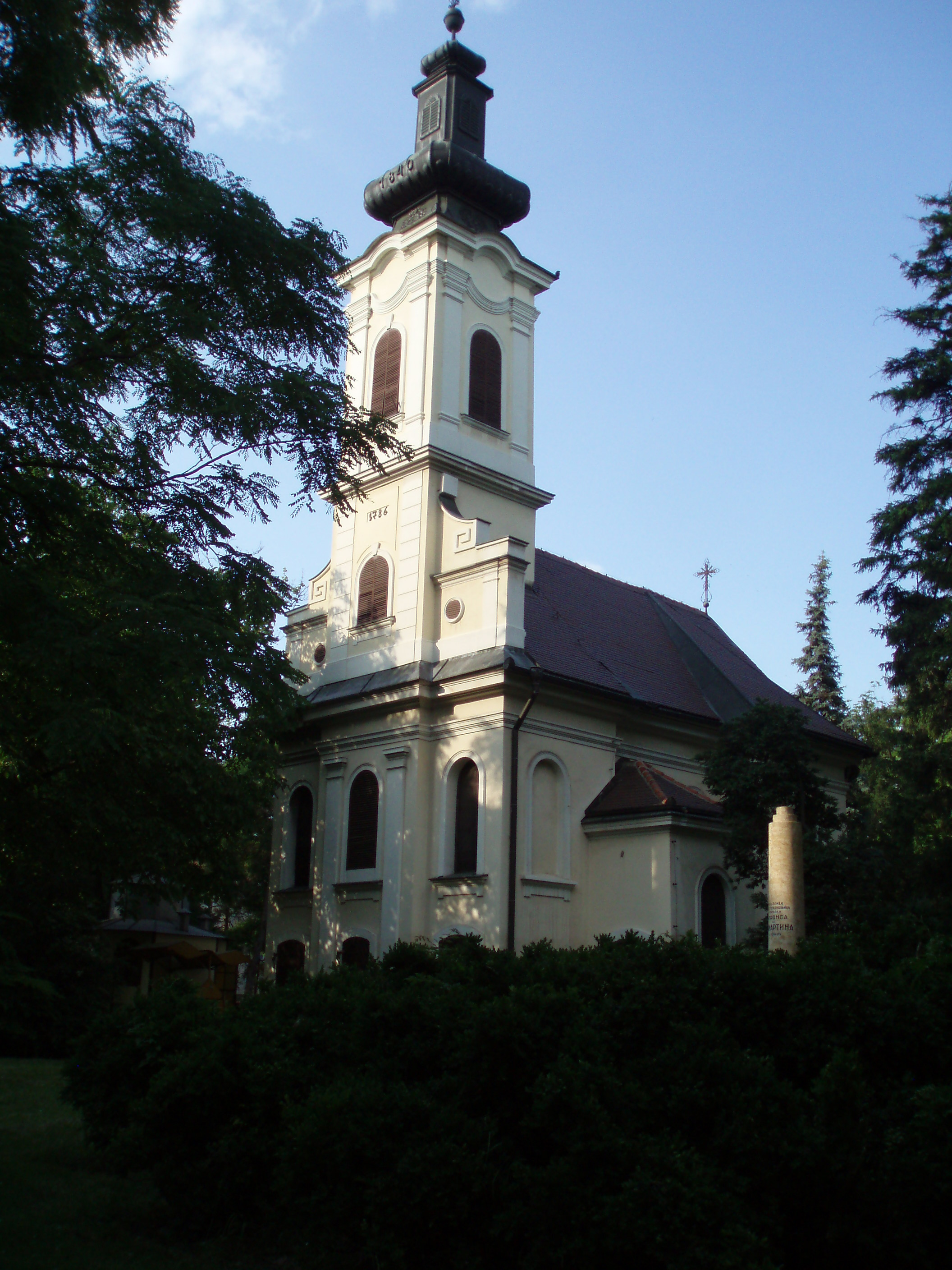 Фотографија цркве светог Архангела Михаила и Гаврила која се налази у Градском парку у Земуну, аутор:Nicolo